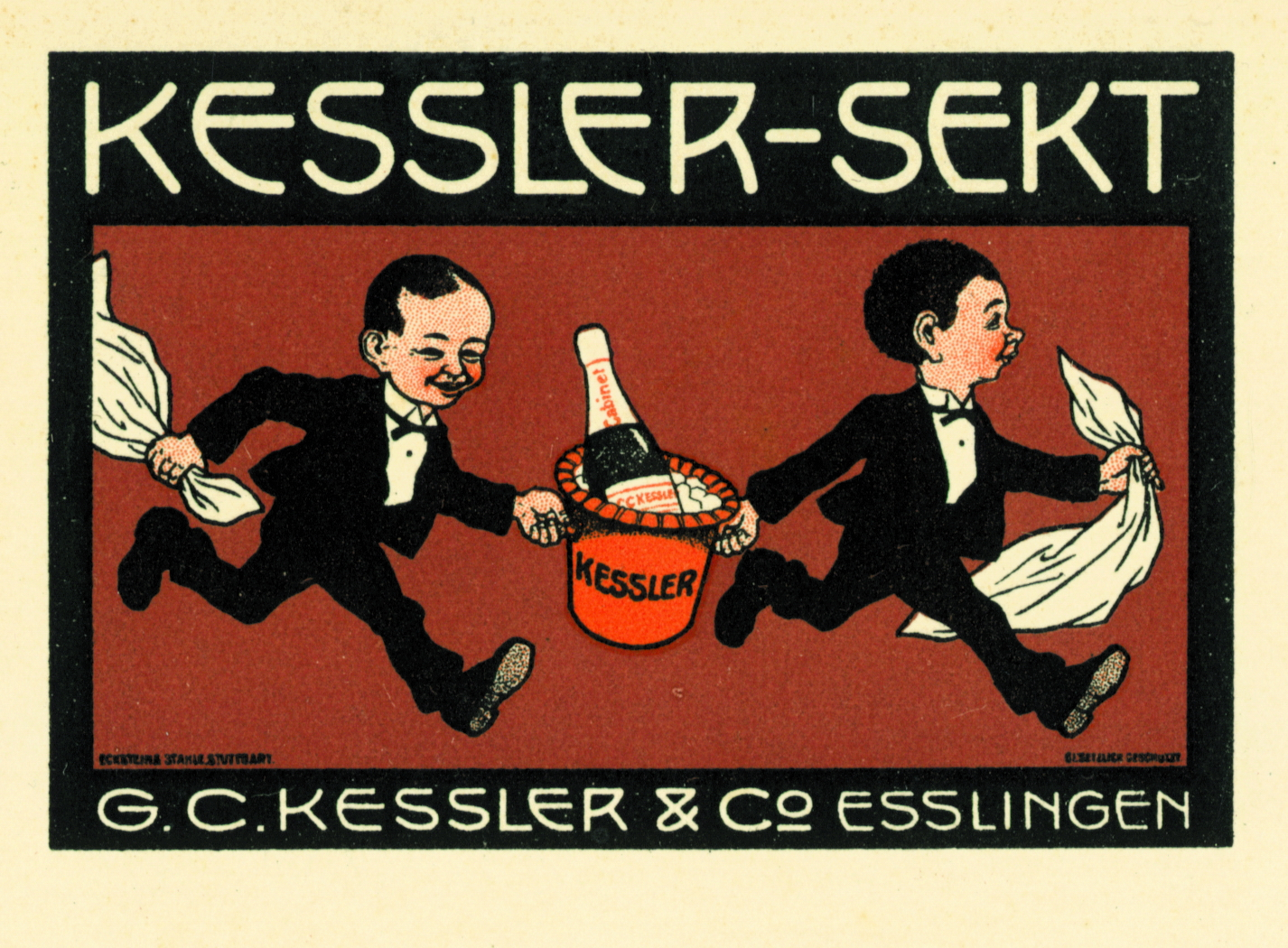 Kessler-Piccolos in der ursprünglichen Version von Josef Benedikt Engl